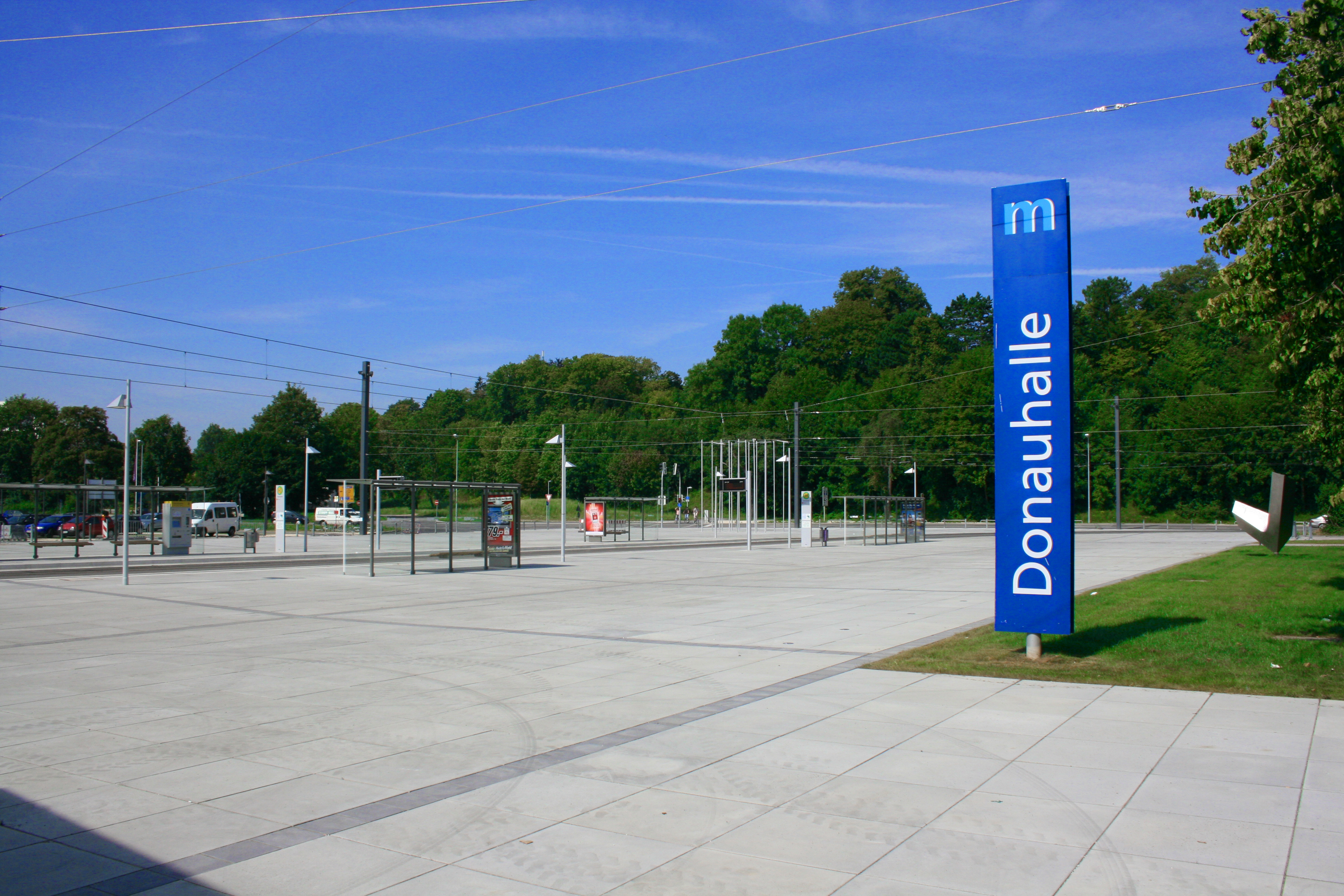 Großformate aus Beton, Format 87,5/87,5/18